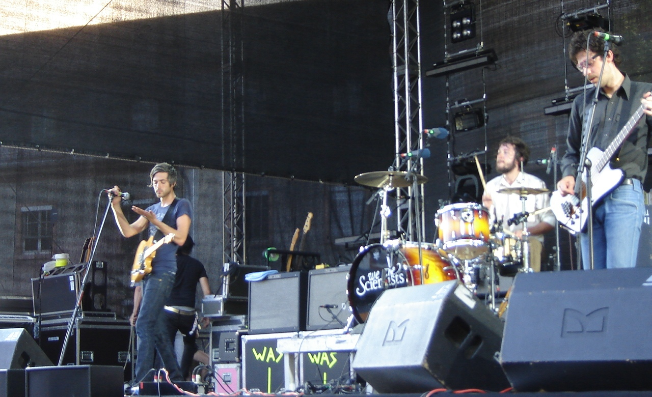 We Are Scientists at Zitadelle, in Mainz, Germany